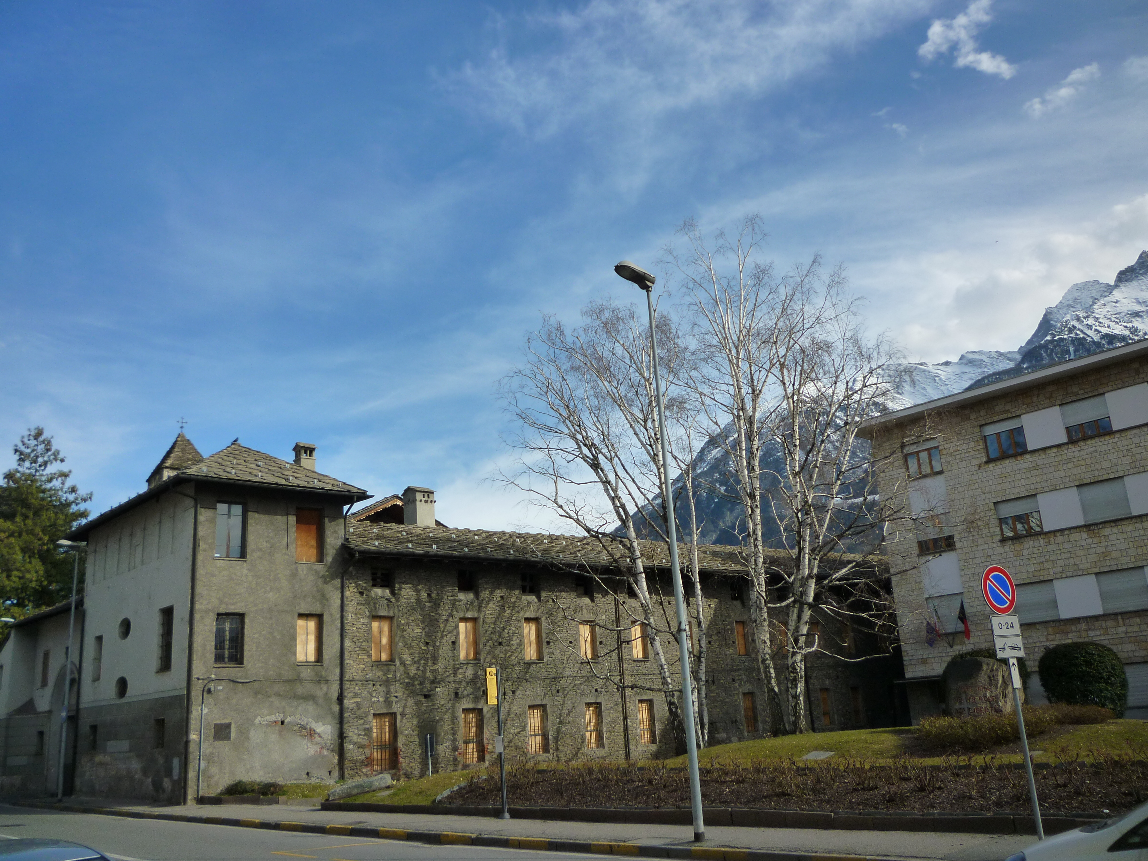 Le Collège Saint-Bénin et l'institut Innocent Manzetti - rue Jean-Baptiste Festaz à Aoste